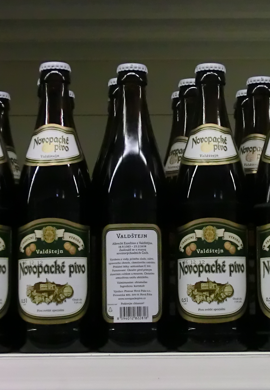 Láhve piva z Pivovaru Nová Paka a.s.: Valdštejn, světlý speciál 15°